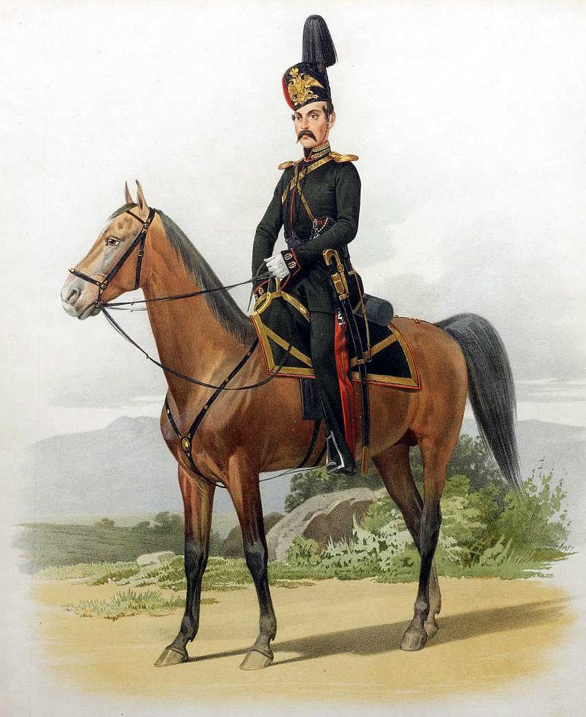 Обер-Офицер Лейб-гвардии Донской казачьей конноартиллерийской батареи. (В парадной форме) 18 марта 1855 года.